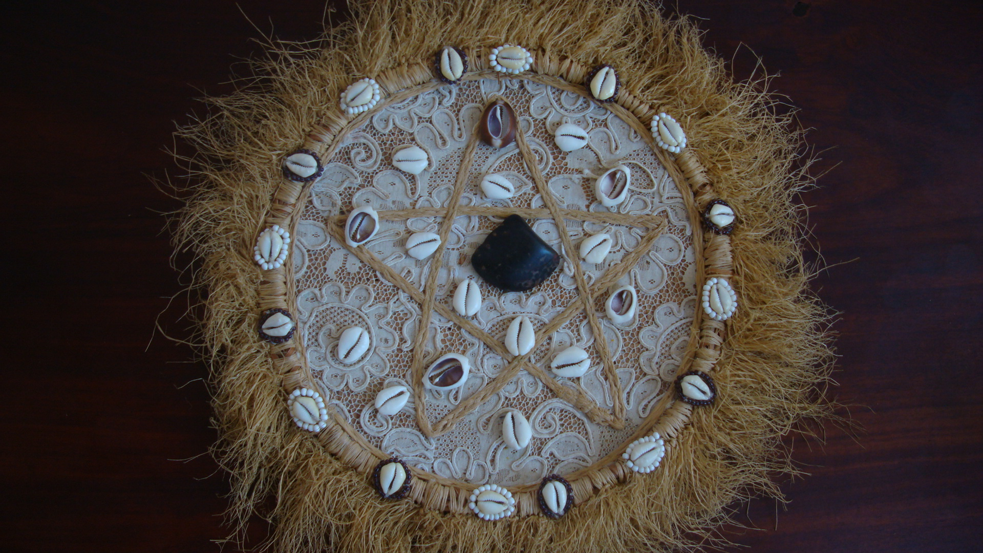 Odu Ôwarin Merindilogun, Salvador, Bahia, Brasil.